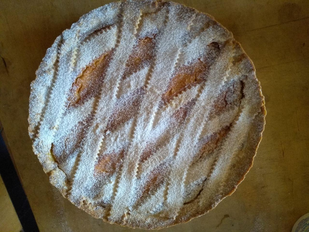 Pastiera napoletana, dolce tipico della tradizione pasquale